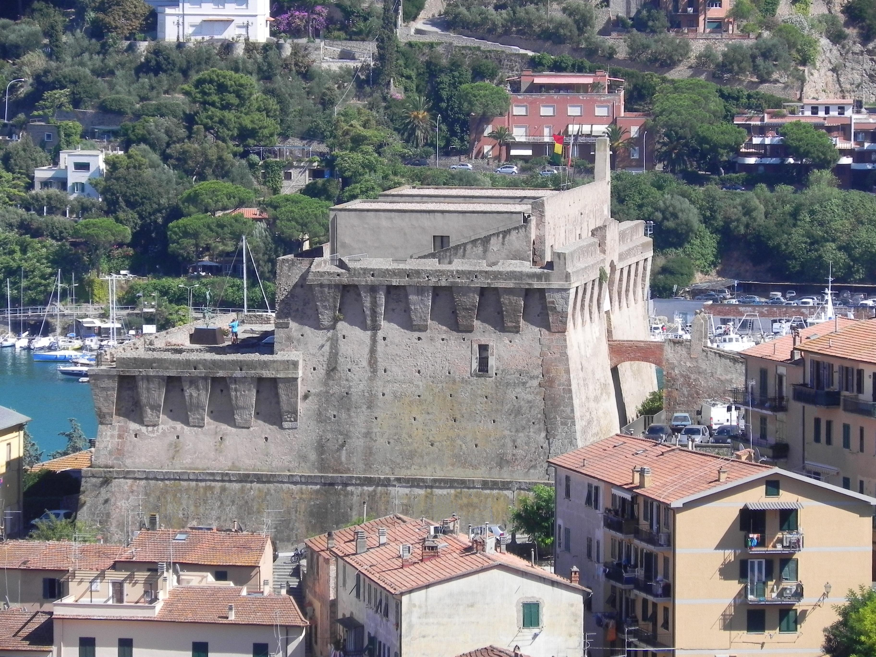 Visione d'insieme della fortezza spagnola di Porto S.Stefano.